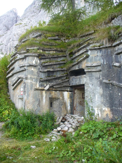 Opera 8 Passo Monte Croce di Comelico